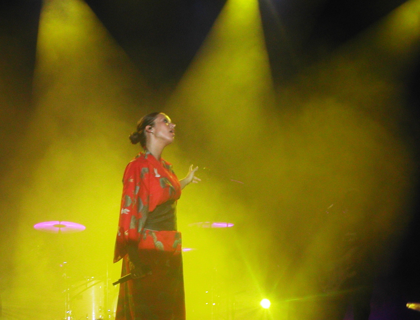 Natasha Saint-Pier en concert au Tampon.